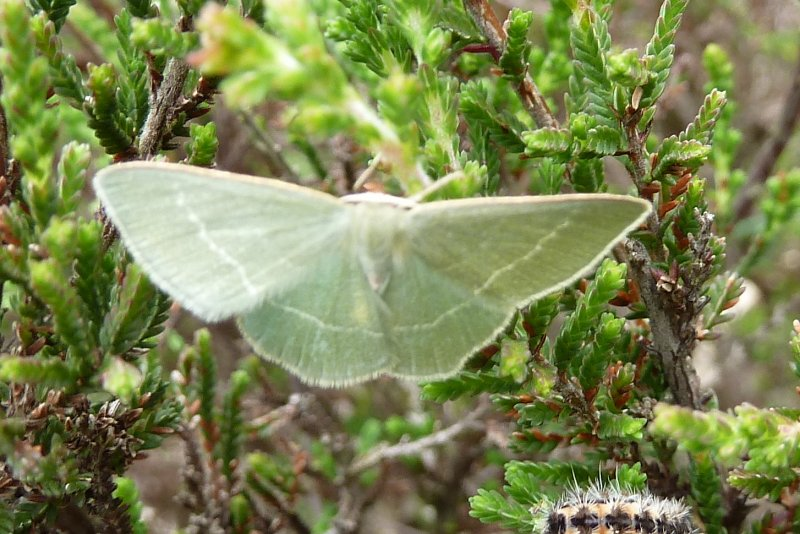 Chlorissa viridata. Location: The Netherlands - Bargerveen - Schoonerbeekerveld